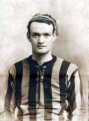 El futbolista irlandés Paddy O'Connell en una fotografái de principios del siglo XX